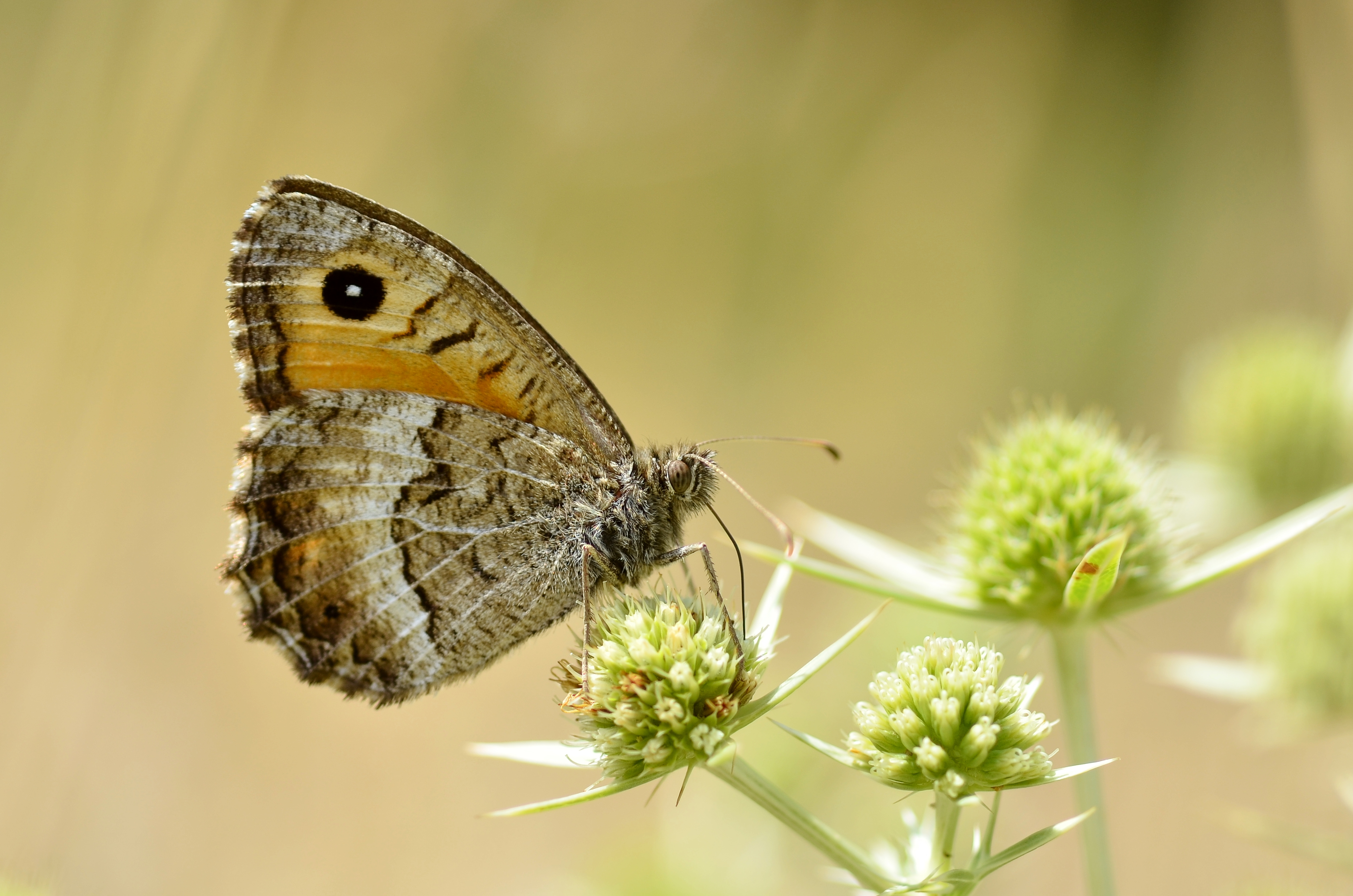 Arethusana arethusa